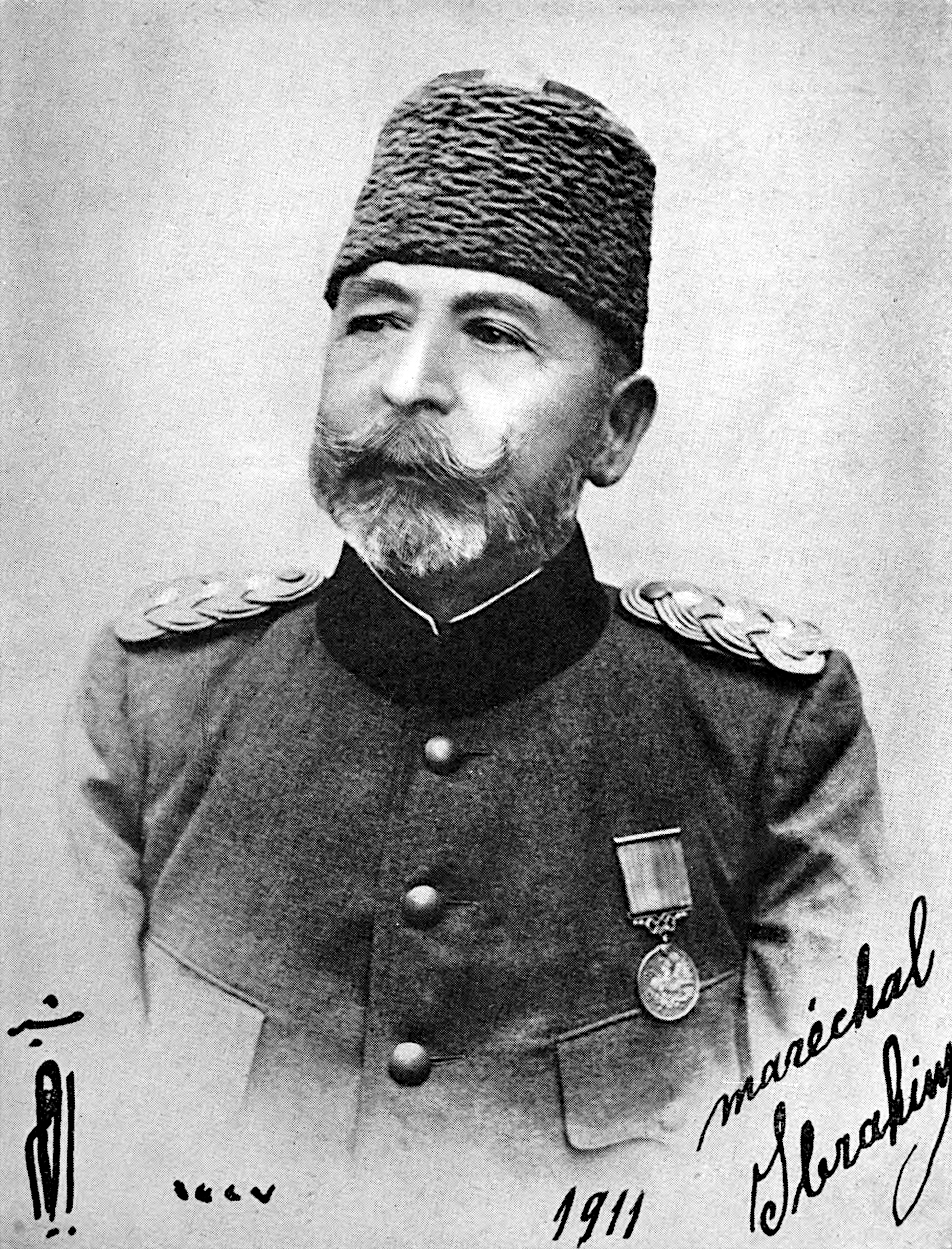 'Son Excellence le Maréchal Ibrahim Pacha, gouverneur de la Tripolitaine au moment de la déclaration de la guerre entre la Turquie et l'Italie.'